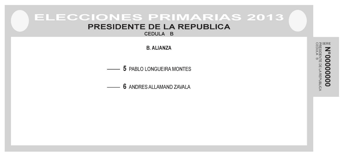 Cédula B de votación para las elecciones primarias presidenciales de 2013, entregada sólo a los militantes de partidos integrantes del pacto Alianza (RN-UDI).